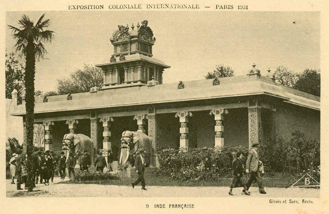 Pavillon des Indes Françaises à l'Exposition Coloniale de PARIS en 1931